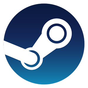 Steam Logo